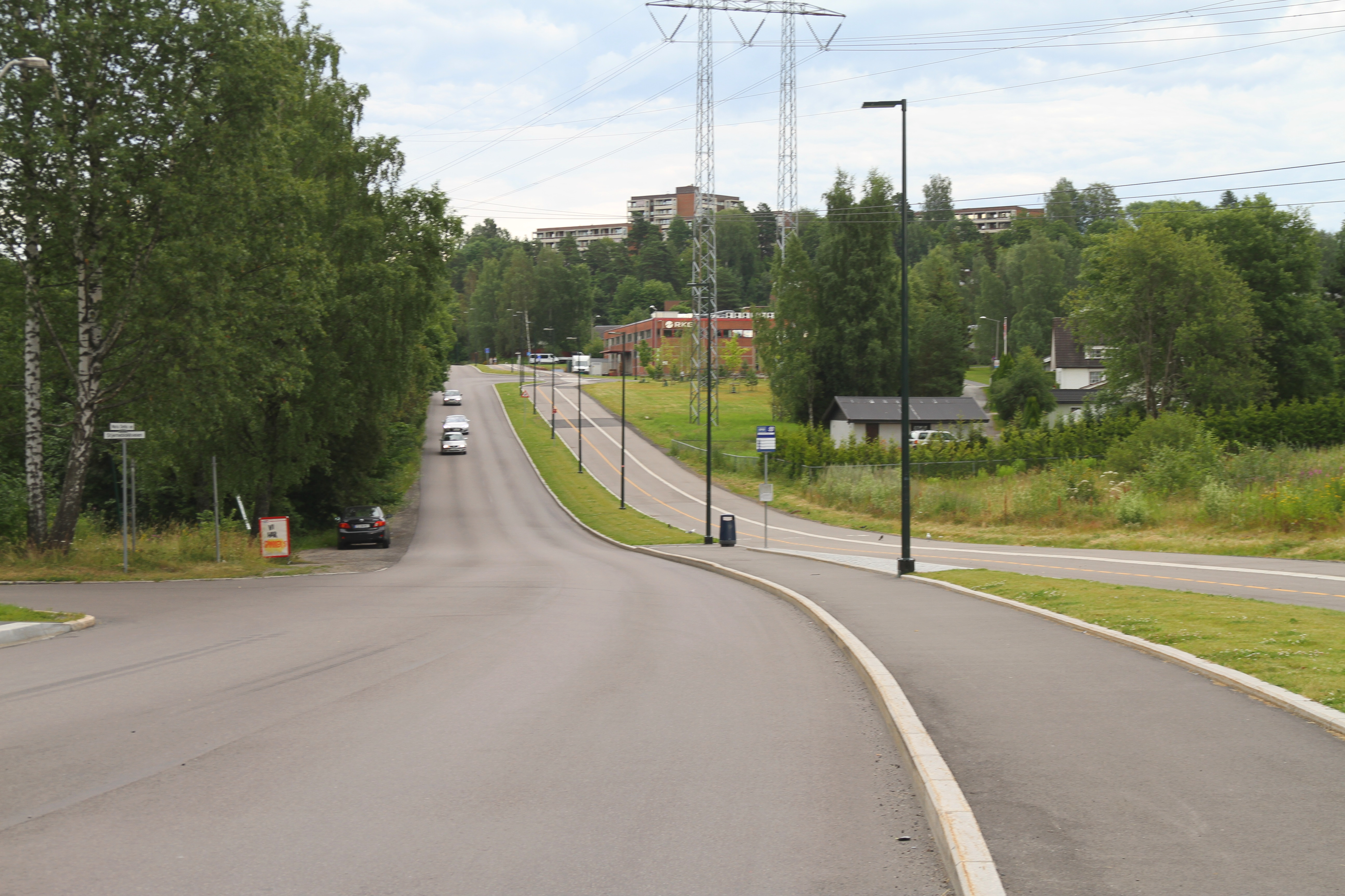 Maria Dehlis vei i Oslo.